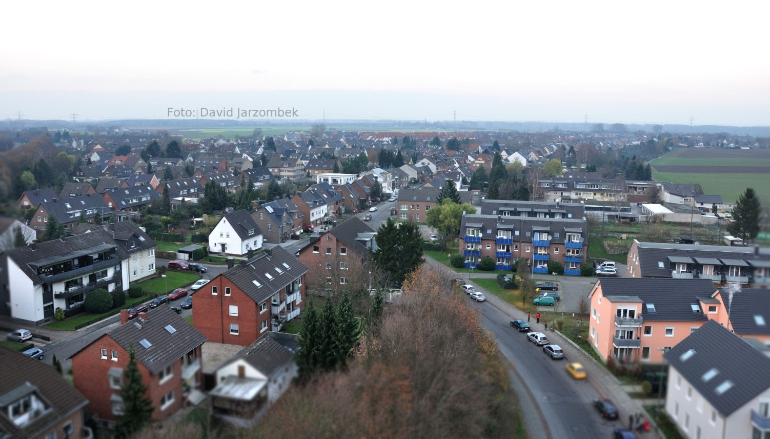 Ein Teil von Rheinfeld. Foto von einem Drehleiter Fahrzeug der Freiwilligen Feuerwehr Dormagen aus einer Höhe von 30 Metern gemacht.